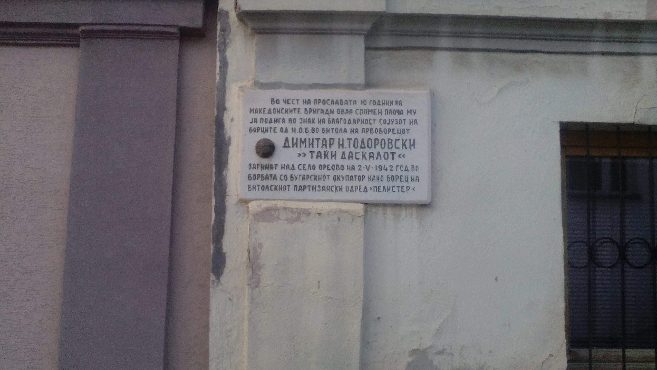 Спомен-плоча посветена на Таки Даскало во Битола